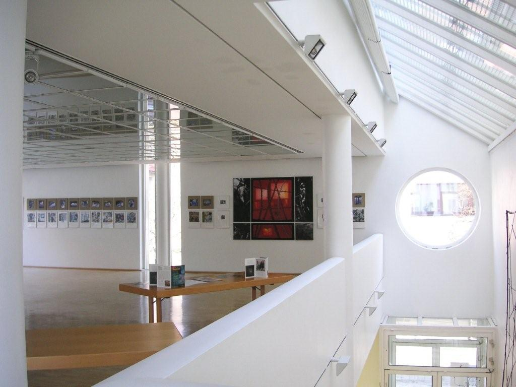 . -2006 Janvier /février « Miroirs d’eau », avec les photographies et les textes de Frédérique Wallet. Musée Tuttlingen, Galerie der Stadt Tuttlingen, Allemagne.